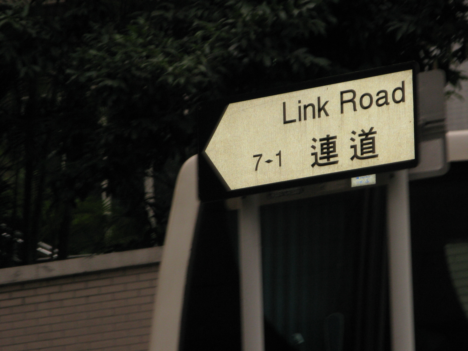 香港連道